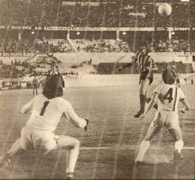 Gol de Roberto Cabral ante San Lorenzo en el estadio Monumental, que le dio el título del Nacional 1973 a Rosario Central.